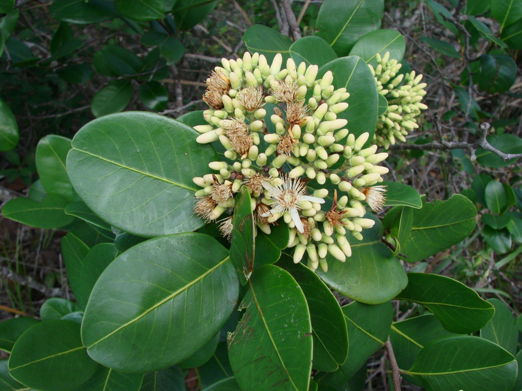 Vantanea obovata (Nees & Mart.) Benth. - HUMIRIACEAE - Parque Nacional da Chapada Diamantina - Palmeiras - Bahia - Brasil.